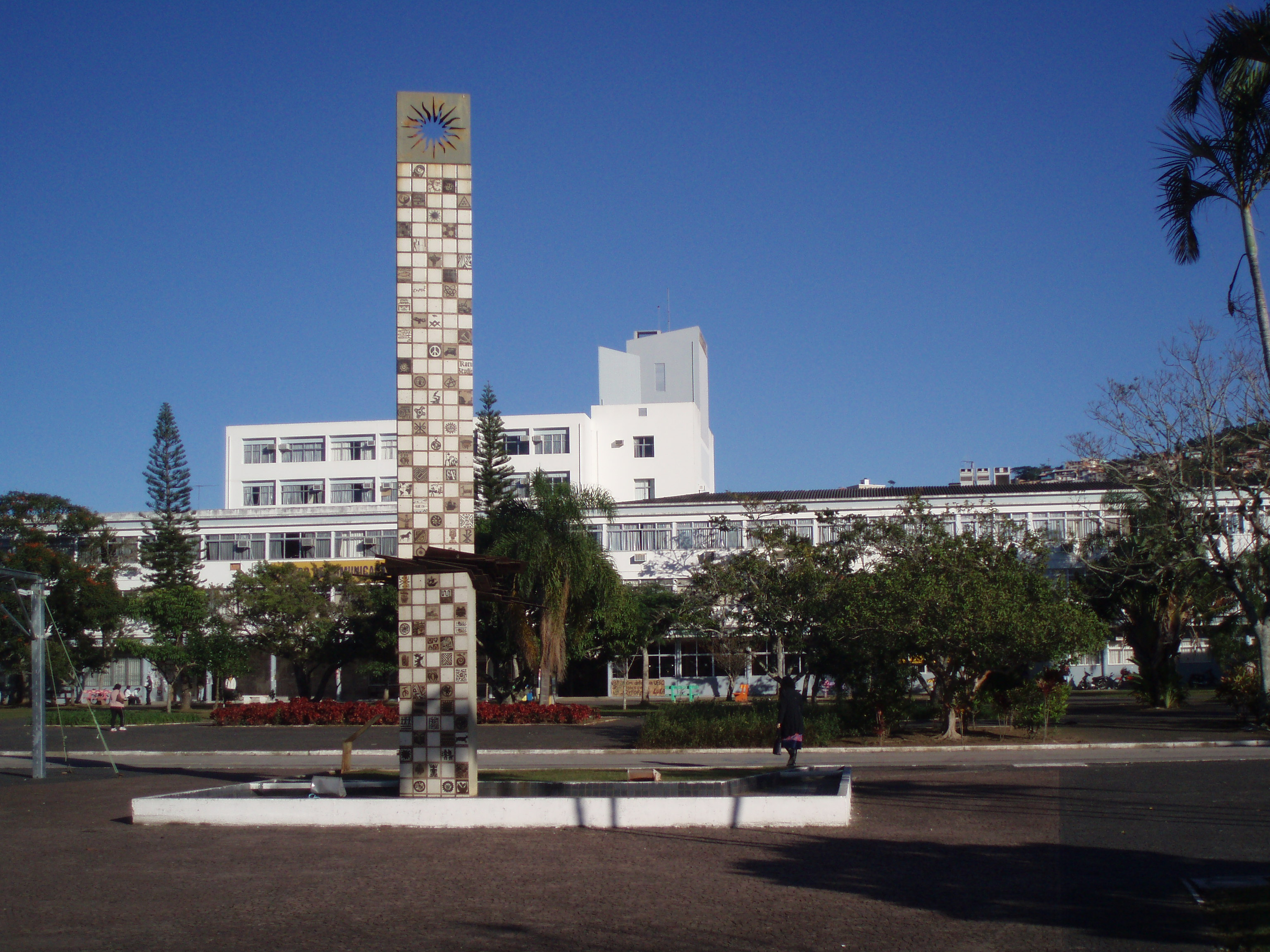 Vue de la place centrale de l'Université fédérale de Santa Catarina, Florianópolis, Brésil.